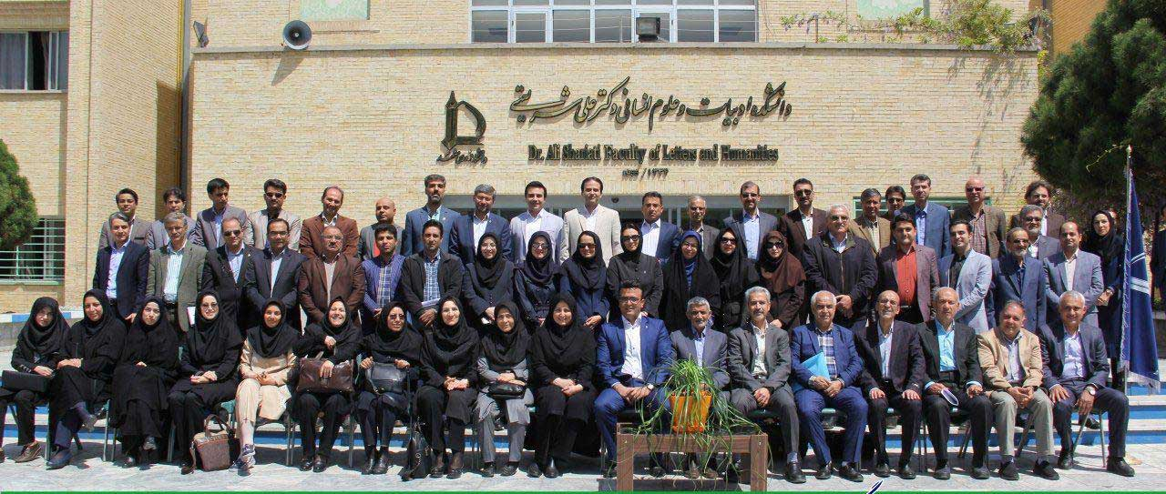 تصویردسته جمعی اعضای هیئت علمی دانشکده ادبیات و علوم انسانی دکتر علی شریعتی در مقابل ساختمان دانشکده